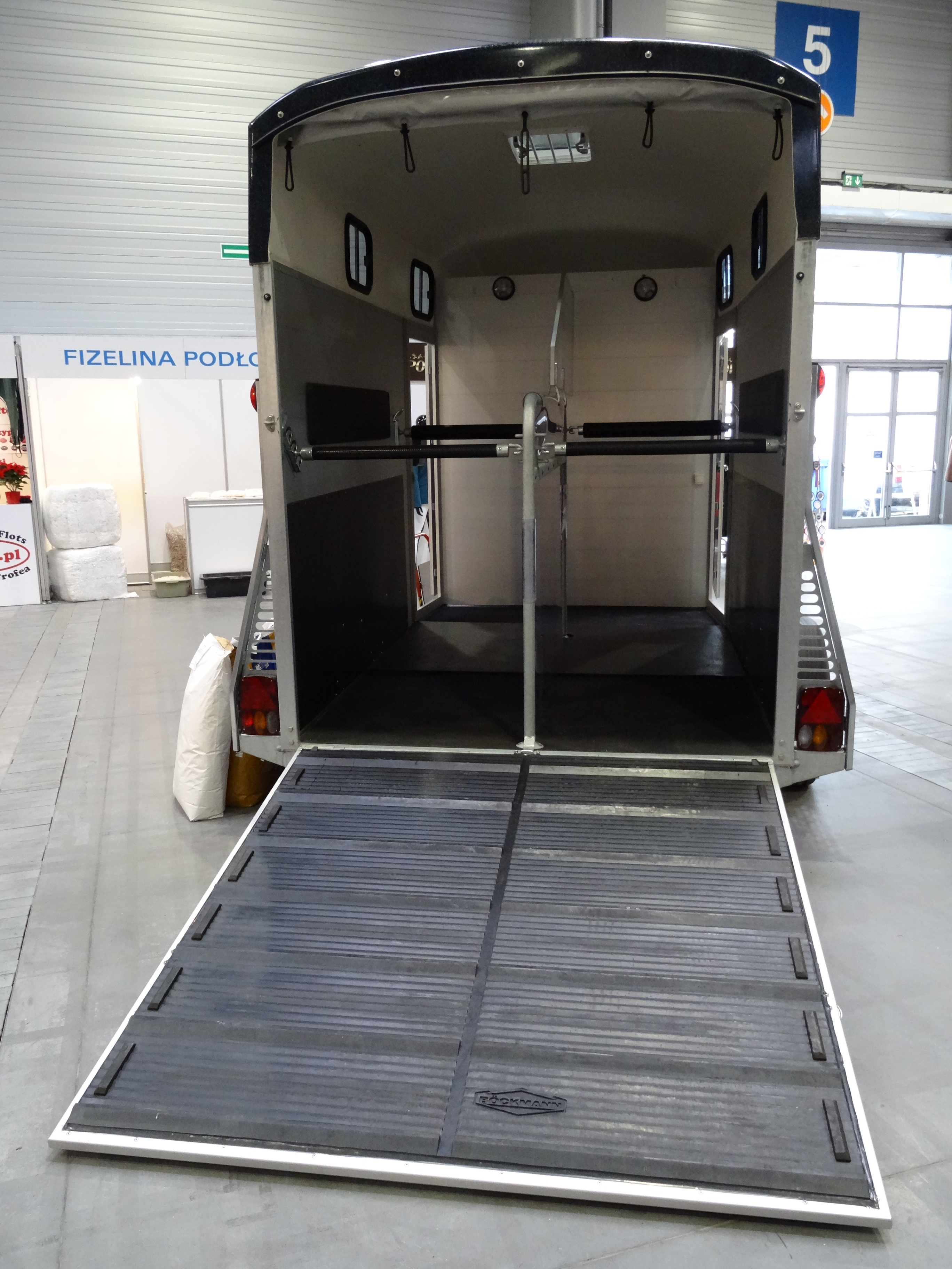 Przyczepa do przewozu koni